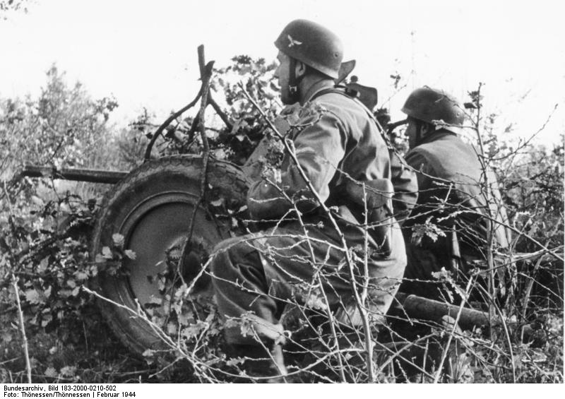 Prop.-Kop. XI. Flg. Korps Film.-Nr: 1821/9 Bildberichter: Tönnessen Text: Dahm Ort: Nettuno-Anzio Datum: Februar 1944 Fallschirmjäger- Pak ist gut getarnt in undurchdringlichem Gestrüpp aufgefahren und sichert gegen herannahende feindliche Panzer. Mancher von ihnen vergass nach einigen Schüssen das Weiterrollen.